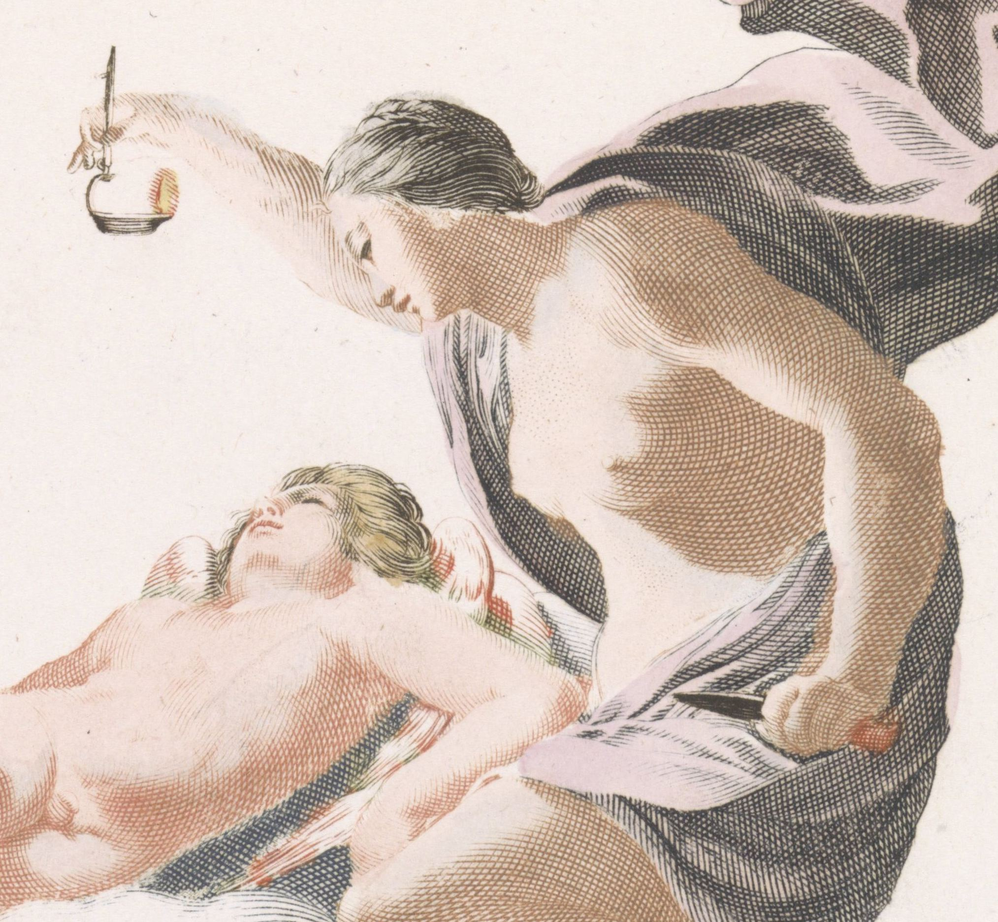 IdentificatieTitel(s): Amor en PsycheObjecttype: prent Objectnummer: RP-P-1937-251Opschriften / Merken: verzamelaarsmerk, verso, gestempeld: (drie maal)Lugt 2228verzamelaarsmerk, verso, gestempeld: Lugt 2760Omschrijving: Psyche bespiedt de god Amor in zijn slaap. Zij heeft een olielamp en een dolk in haar handen. Psyche schrikt door de schoonheid van Amor en knoeit een druppel olie uit haar lamp, Waar: door hij zal ontwaken.VervaardigingVervaardiger: prentmaker: anoniemnaar schilderij van: Simon Vouetsupervisie: Johan TeylerPlaats vervaardiging: NederlandDatering: 1688 - 1698Fysieke kenmerken: gravure à la poupée, met de hand gekleurdMateriaal: papier Techniek: graveren (drukprocedé) / à la poupée / kleurendruk / met de hand kleurenAfmetingen: plaatrand: h 206 mm × b 239 mmOnderwerpWat: Psyche, holding a lamp, gazes at the sleeping Cupid, who awakens when a drop of hot oil falls on himVerwerving en rechtenCredit line: Legaat van de heer F.G. Waller, AmsterdamVerwerving: legaat 1937Copyright: Publiek domein